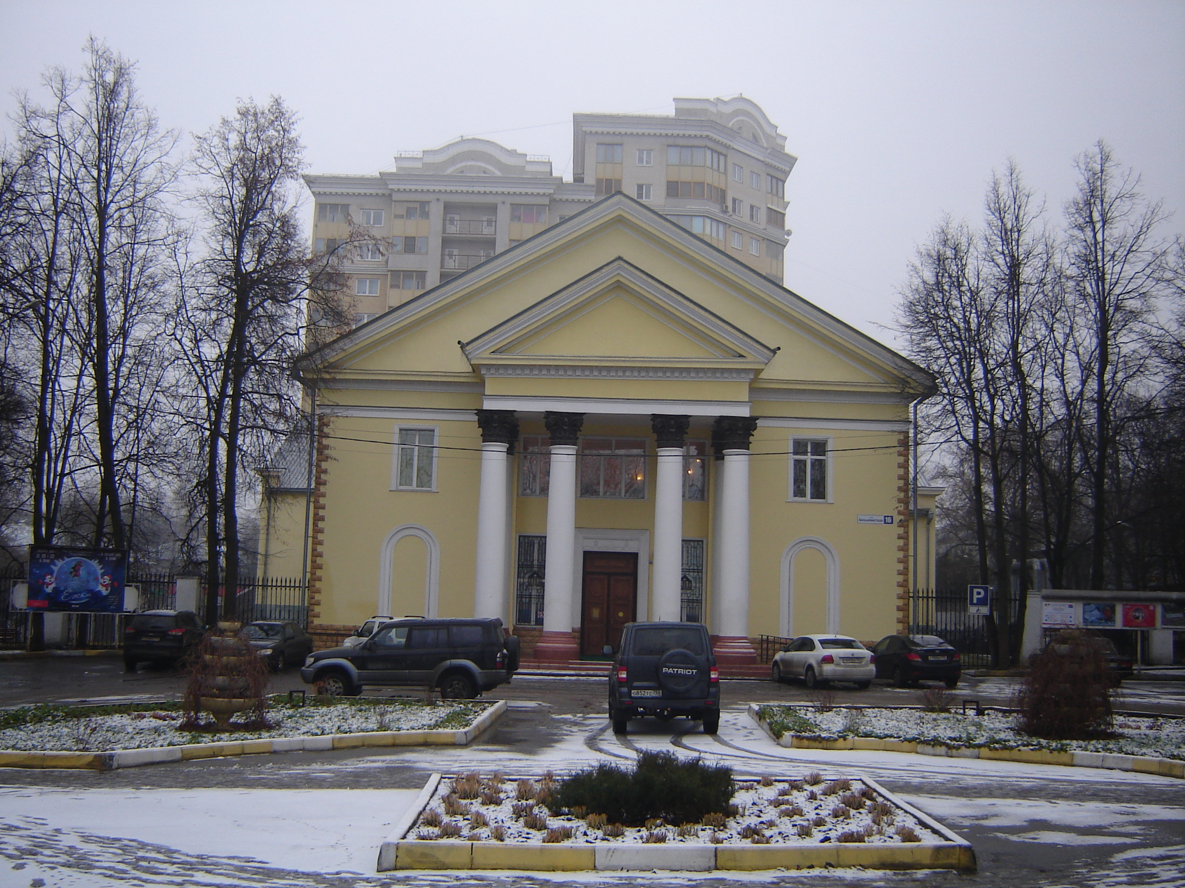 Расположен на бывшем месте клуба "Дмитлага", привезённого из Медвежьегорска в 1933 году после строительства Беломоро-Балтийского канала